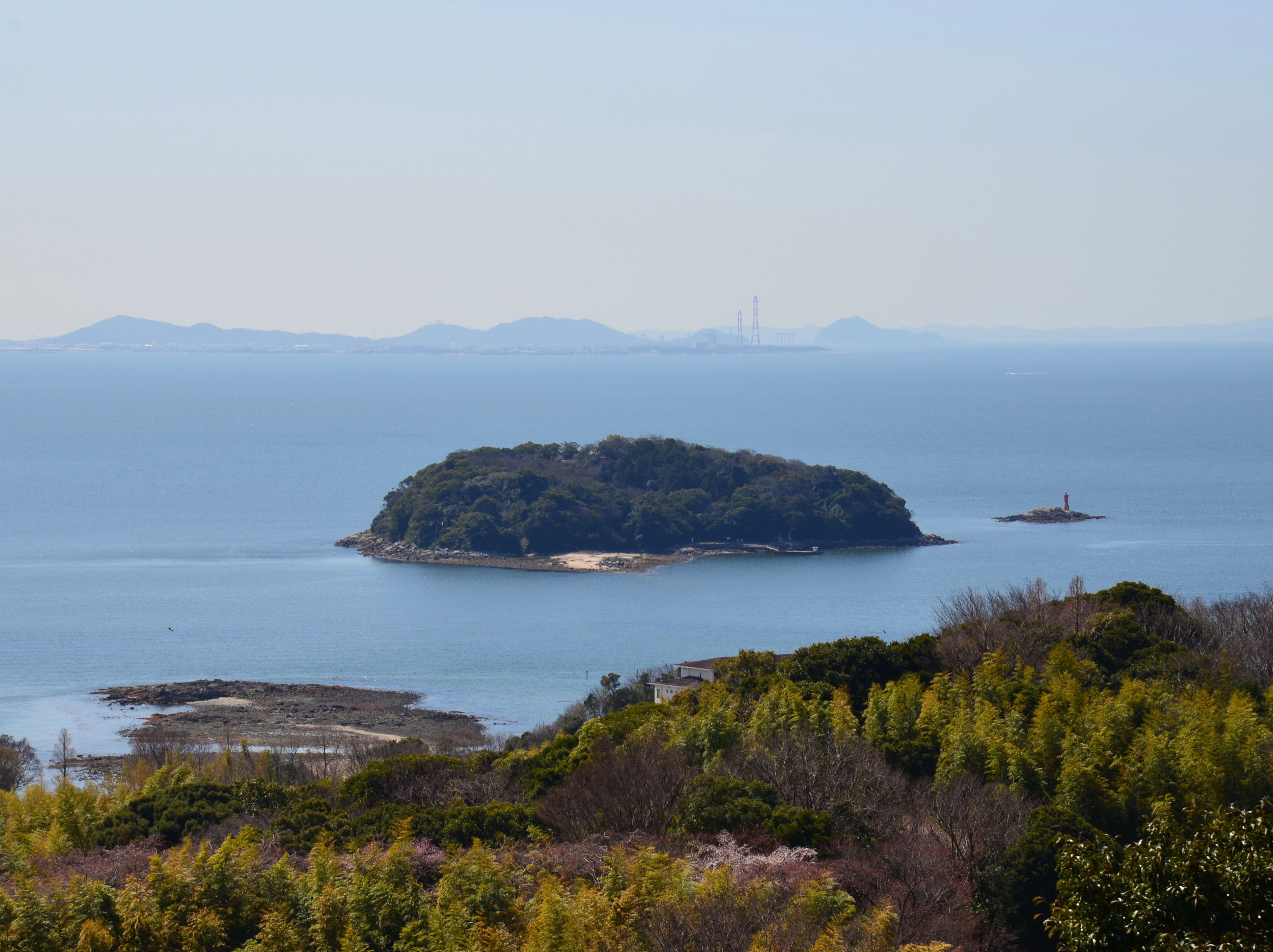 沖島。愛知こどもの国展望広場より撮影